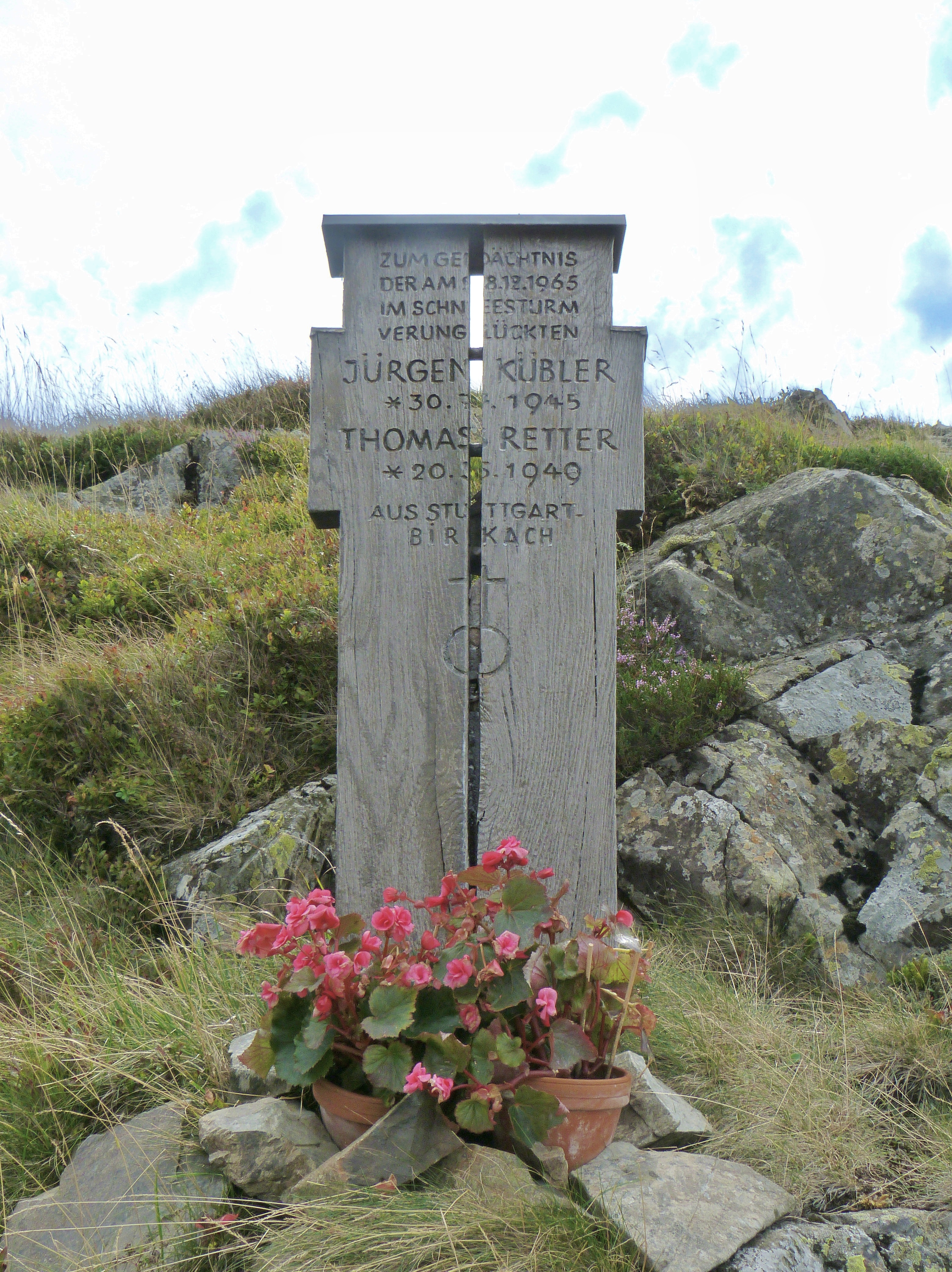 Monument érigé en mémoire de Jürgen Kübler et de Thomas Retter au sommet du Rothenbachkopf (massif des Vosges).